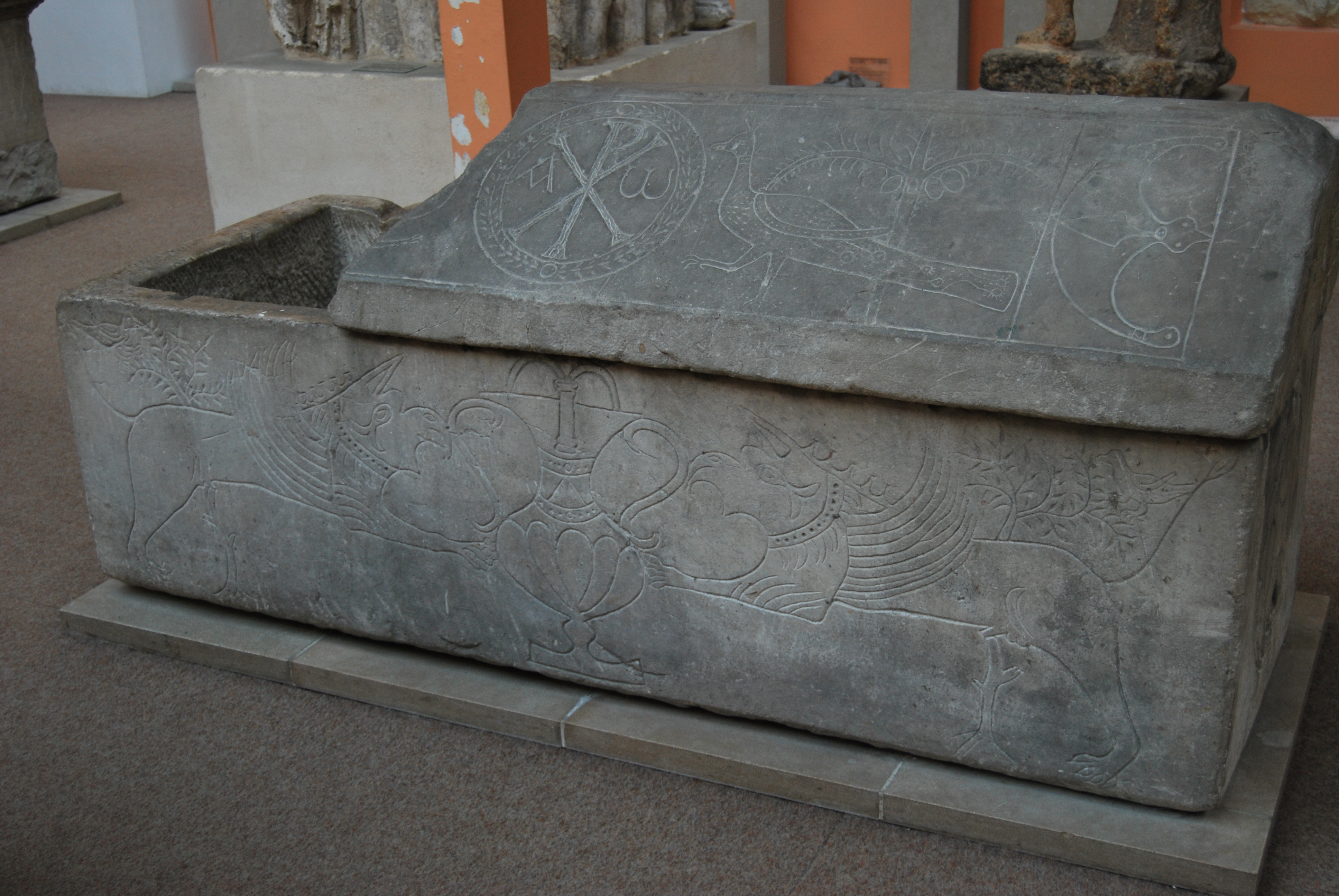 Vue latérale du sarcophage de Saint Chalan, datant du début du VIIe et provenant de l'église abbatiale de Charenton du Cher.